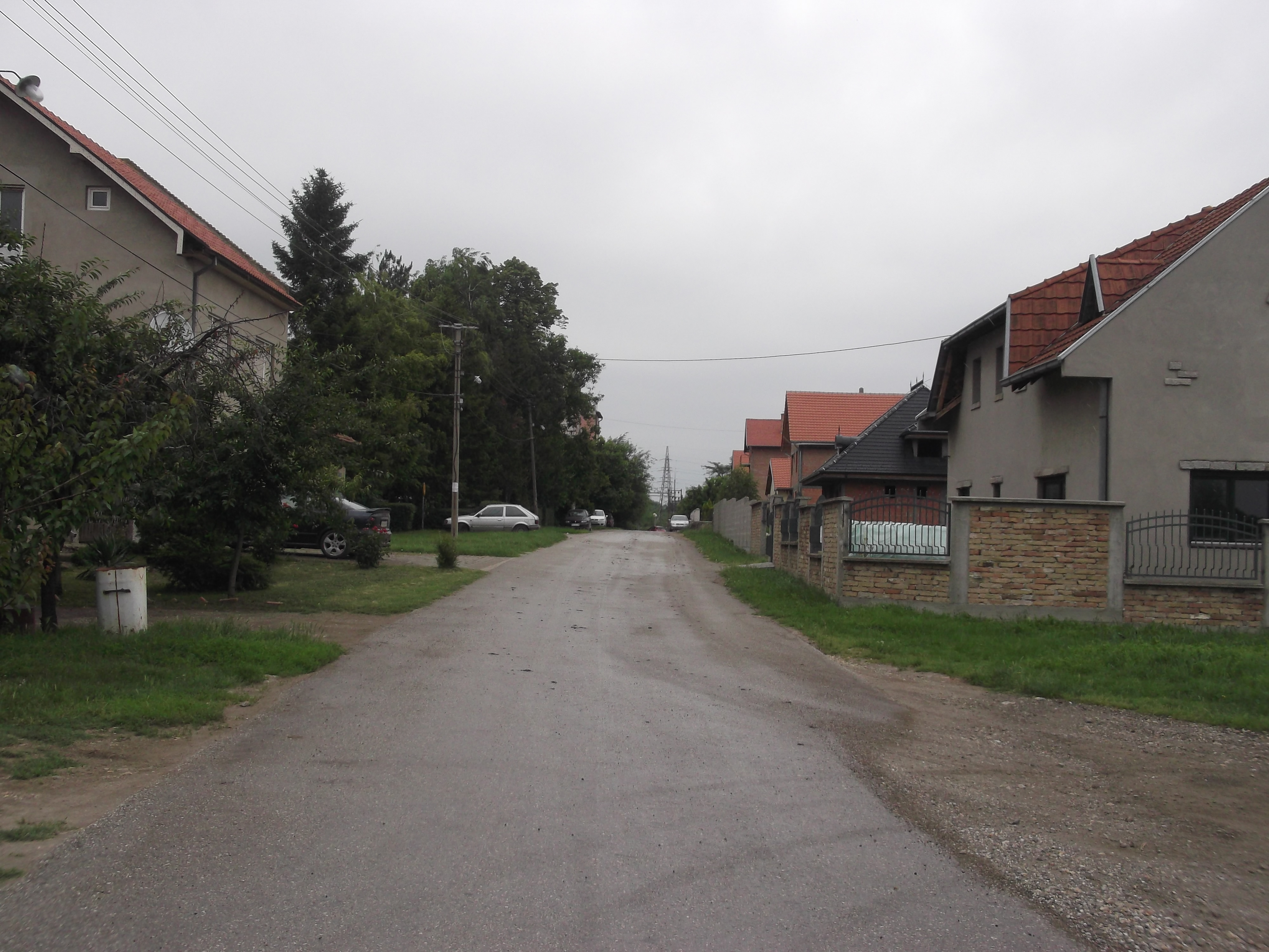 Joakima Vujica Street